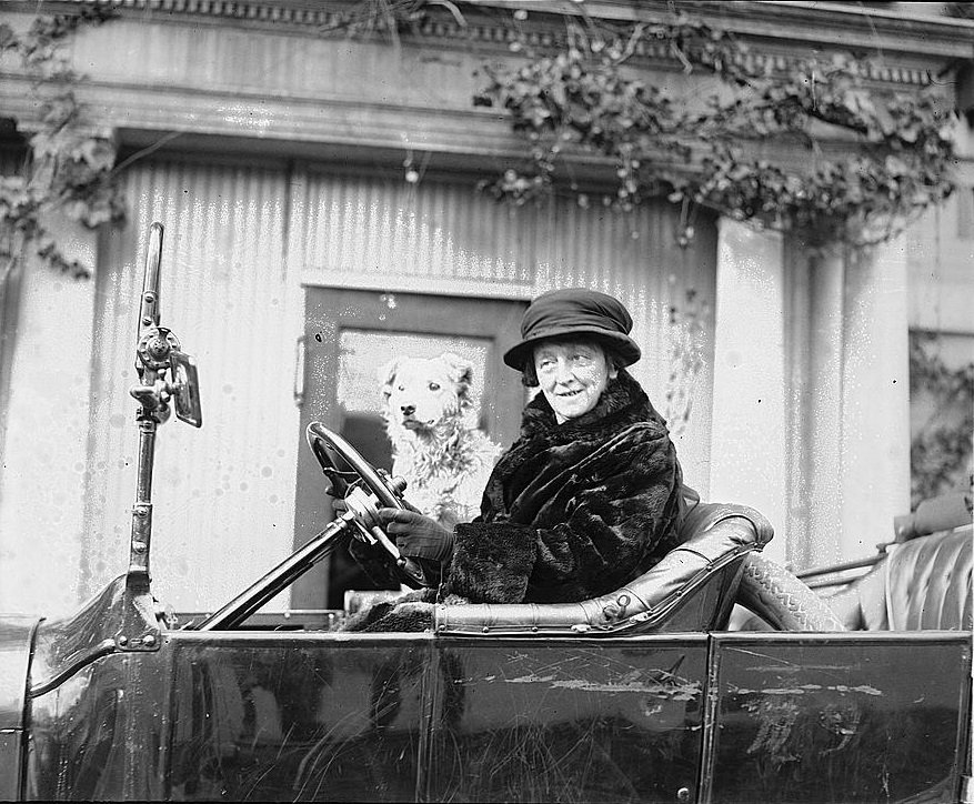 Miss Maud Younger, 12/16/20